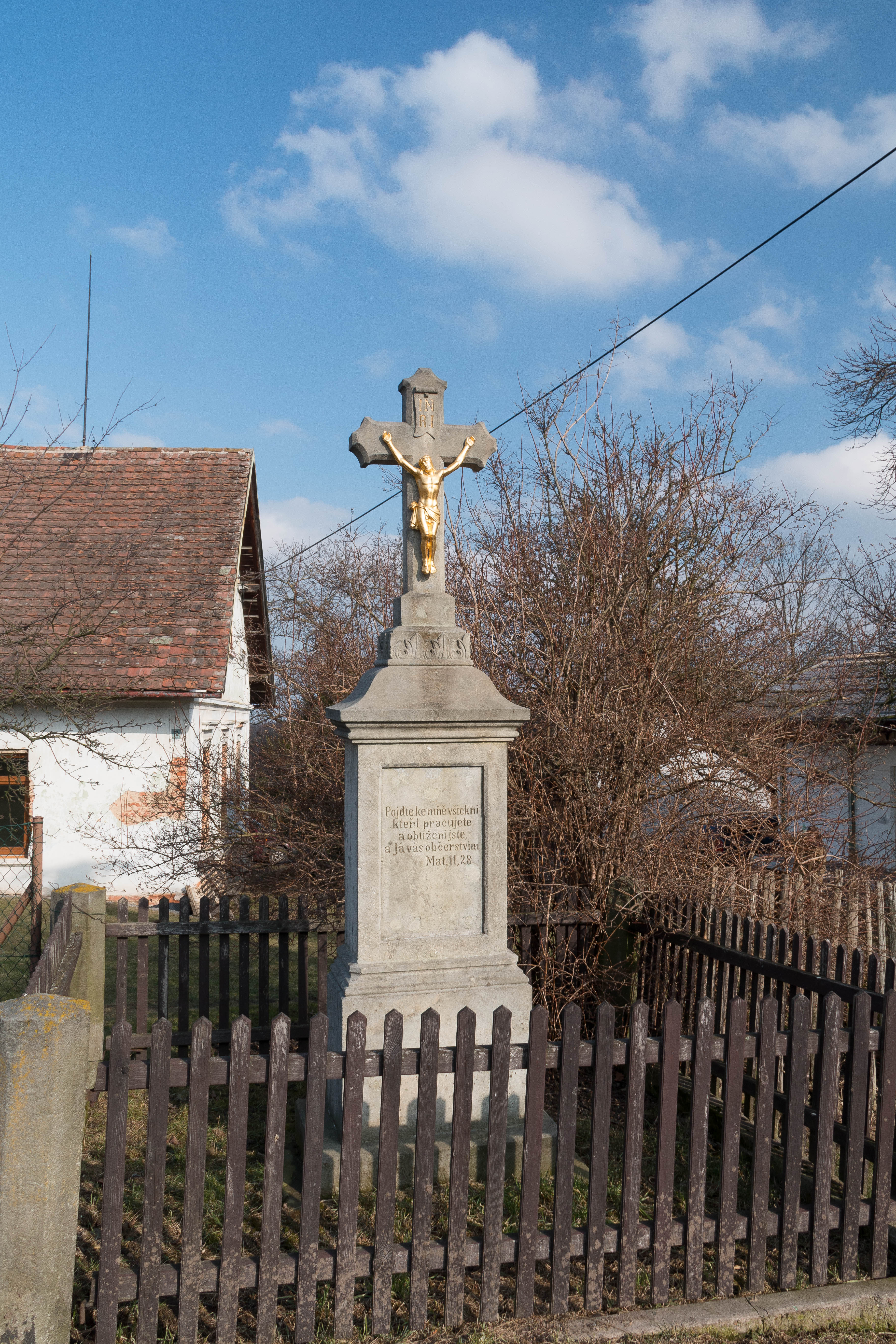 Vížky u Lukavice kříž